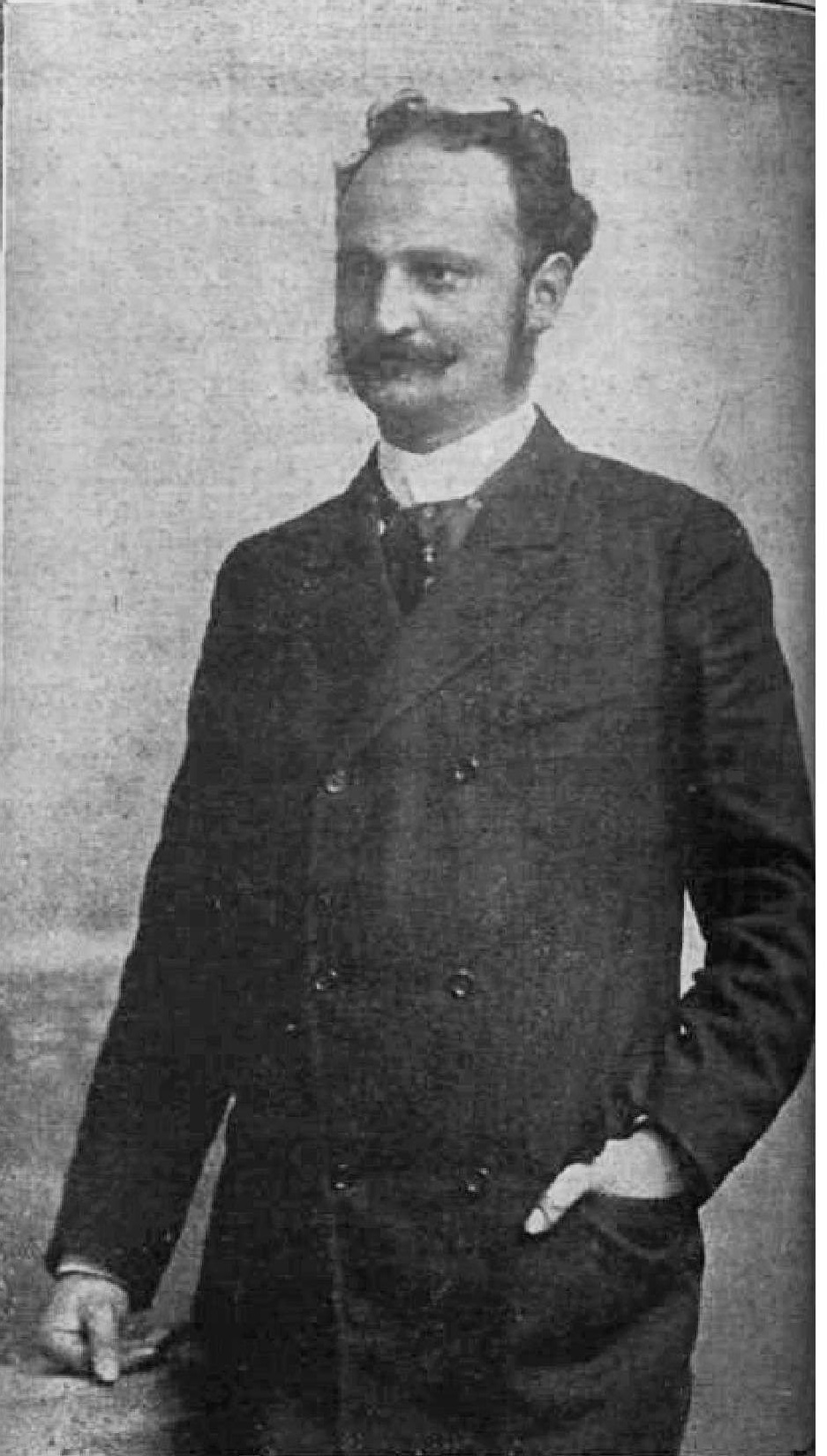 Wlassics Gyula, vallás- és közoktatásügyi miniszter